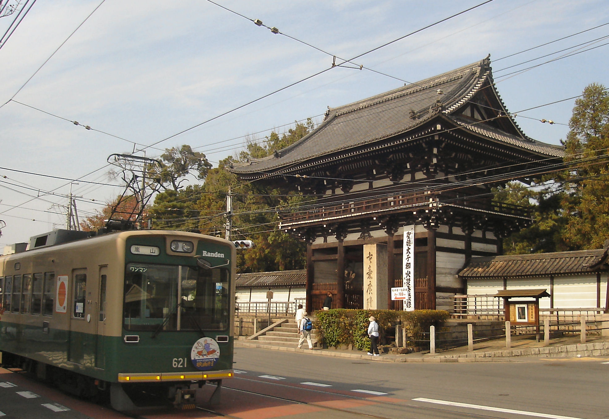 Kouryuji Roumon , kyoto japan